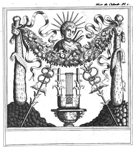 Illustration pour Le Monde primitif, analisé et comparé avec le monde moderne : avec des figures en taille-douce par A. Remanet, Volume 4, ouvrage collectif sous la direction de Antoine Court de Gébelin.